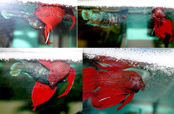 Accoppiamento di Betta Splendens Marrabbio2